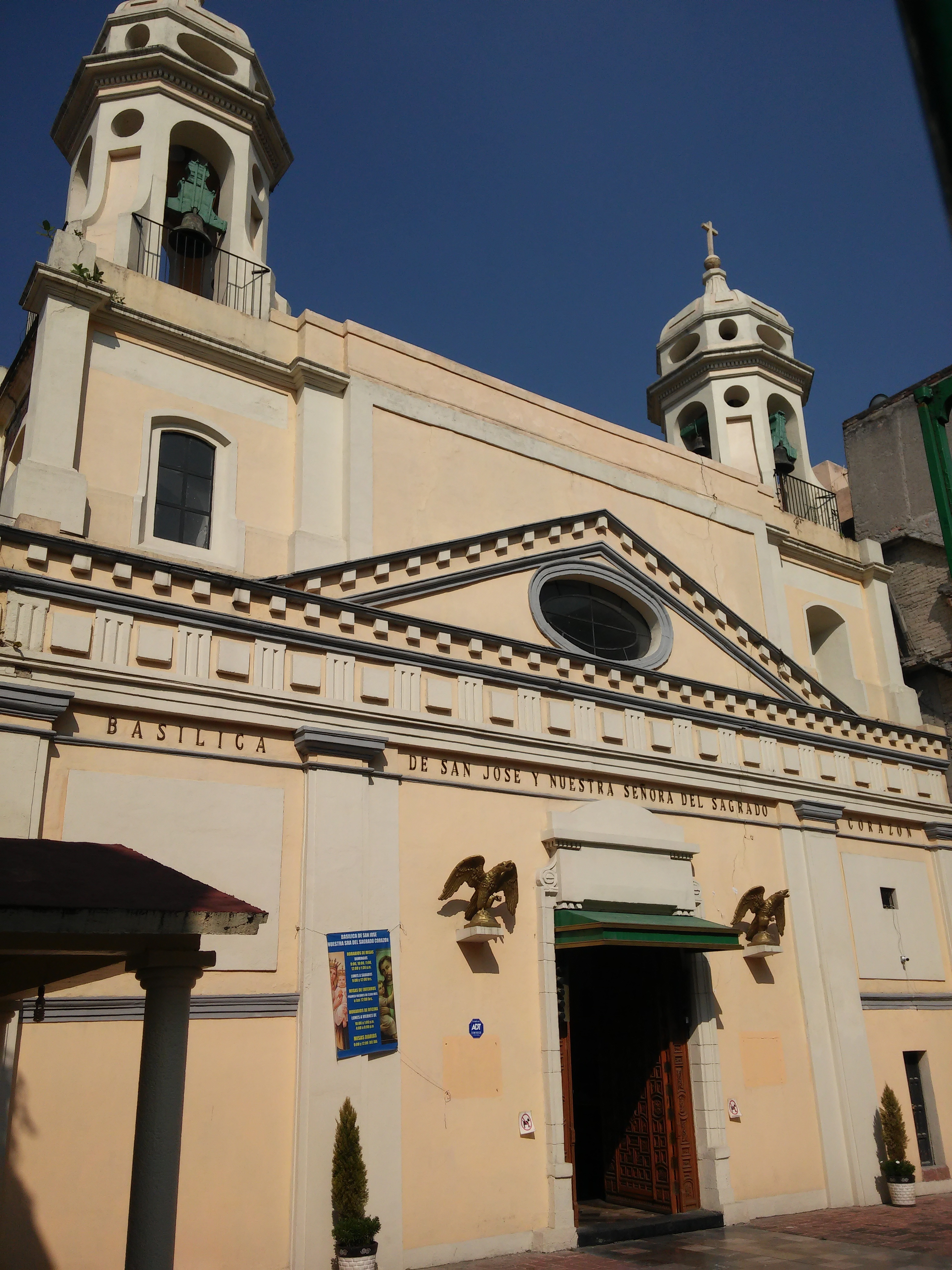 Basilica de San José Ciudad de México